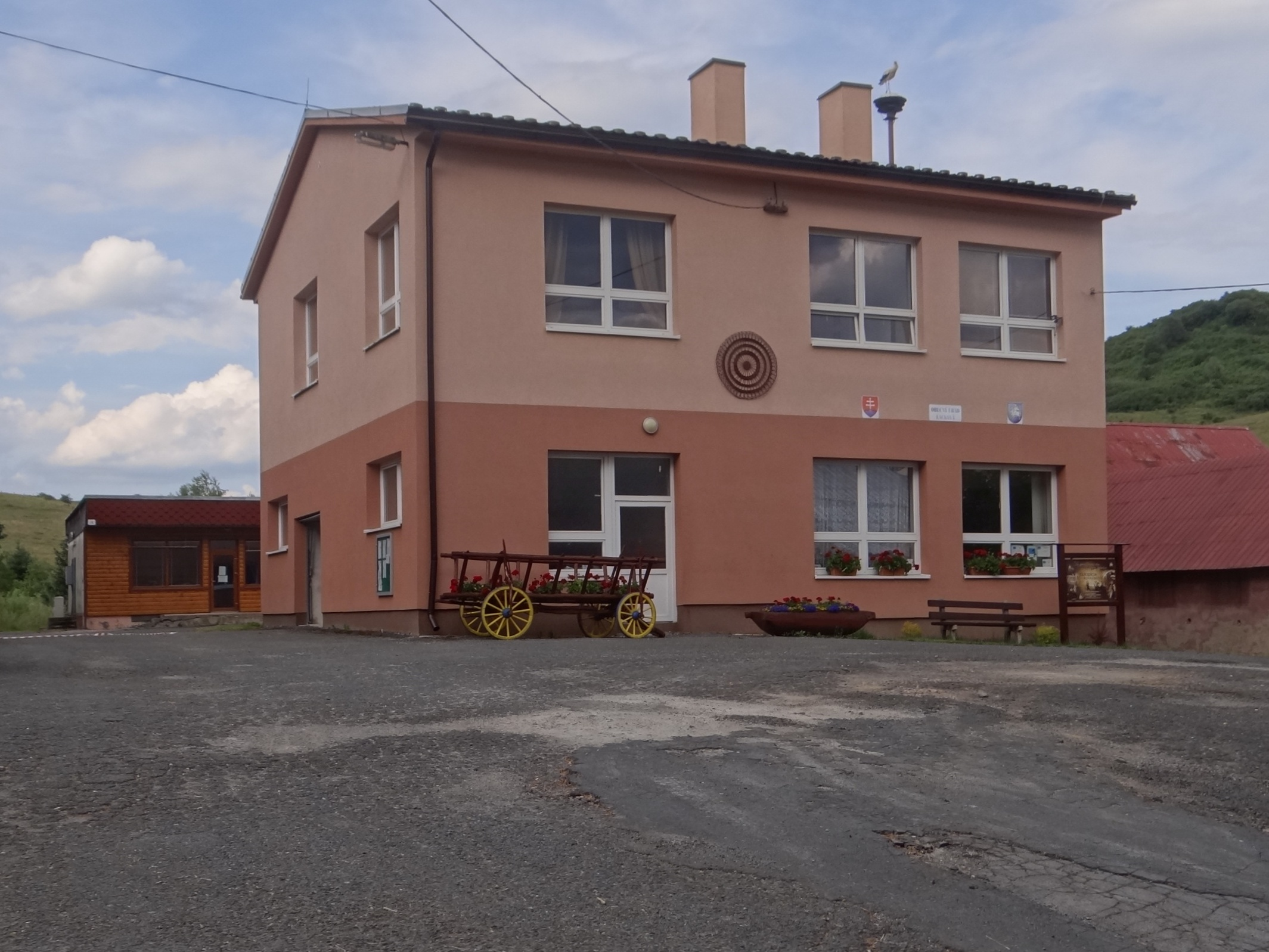 Lacková